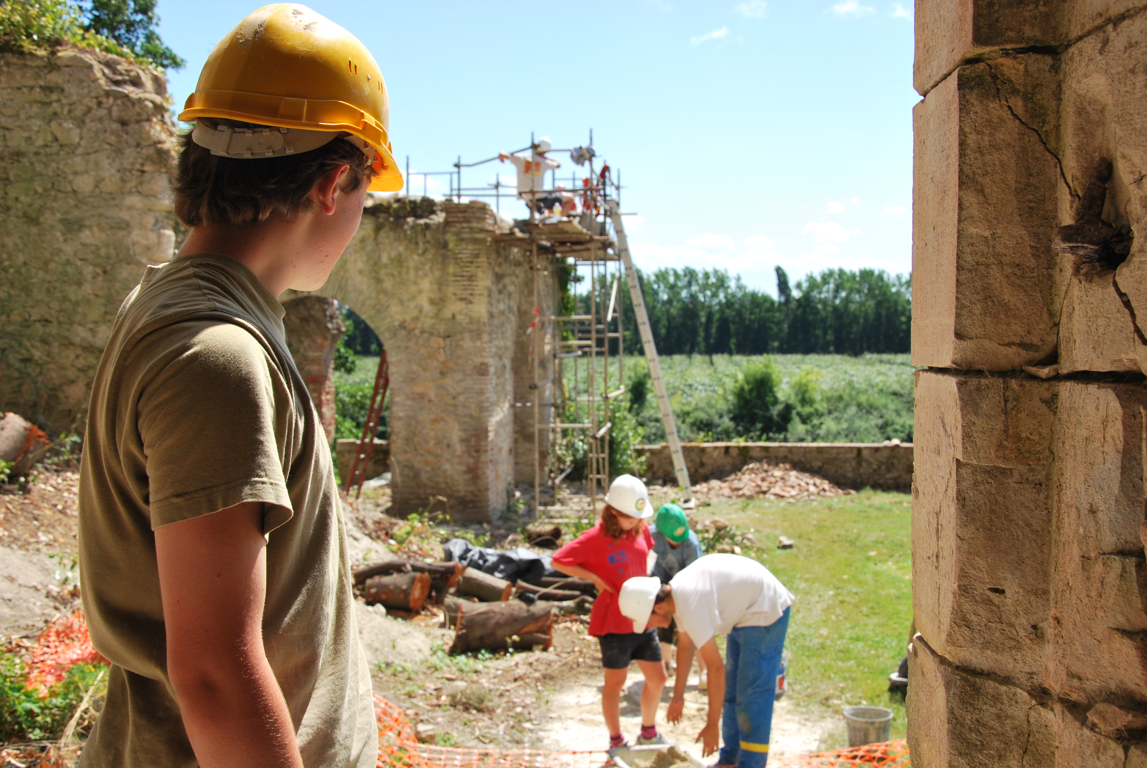 Cette photo montre une des activités proposées au sein du Club du Vieux Manoir. Il s'agit des camps chantiers patrimoine qui ont pour objectif de créer un projet commun aux jeunes bénévoles à travers la restauration de monuments.